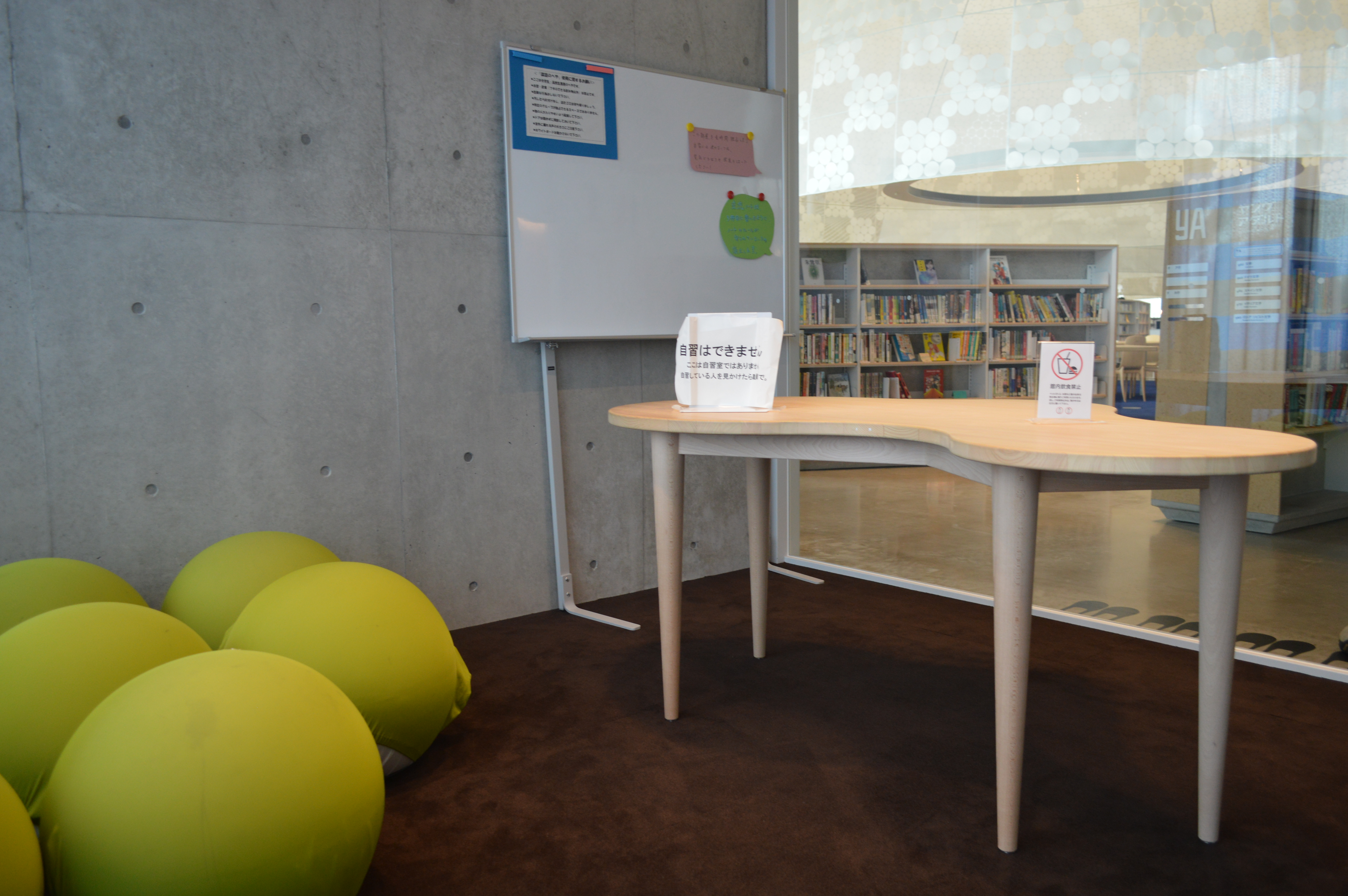 岐阜県岐阜市にあるみんなの森 ぎふメディアコスモス2階の岐阜市立中央図書館。ヤングアダルト専用の談話のへや。扉を閉めることを禁止している。